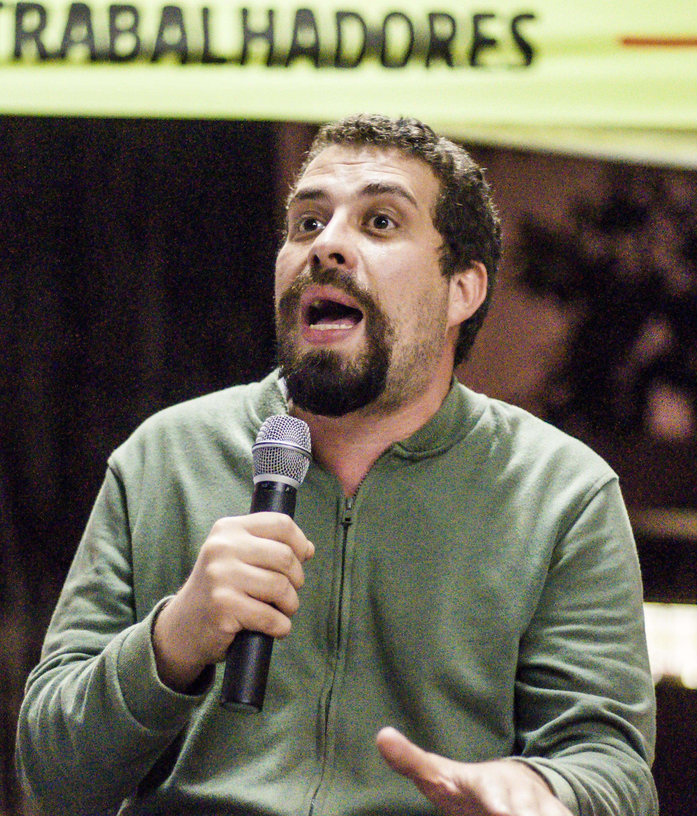 Vamos! sobre democratização da justiça - 7/11/2017 - Brasilia DF Vamos! sobre democratização da justiça com as presenças de GOG, Beatriz Vargas, Guilherme Boulos, Cristiano Maronna, Camila Gomes e Luciana Zaffalon. Fotos: Mídia NINJA